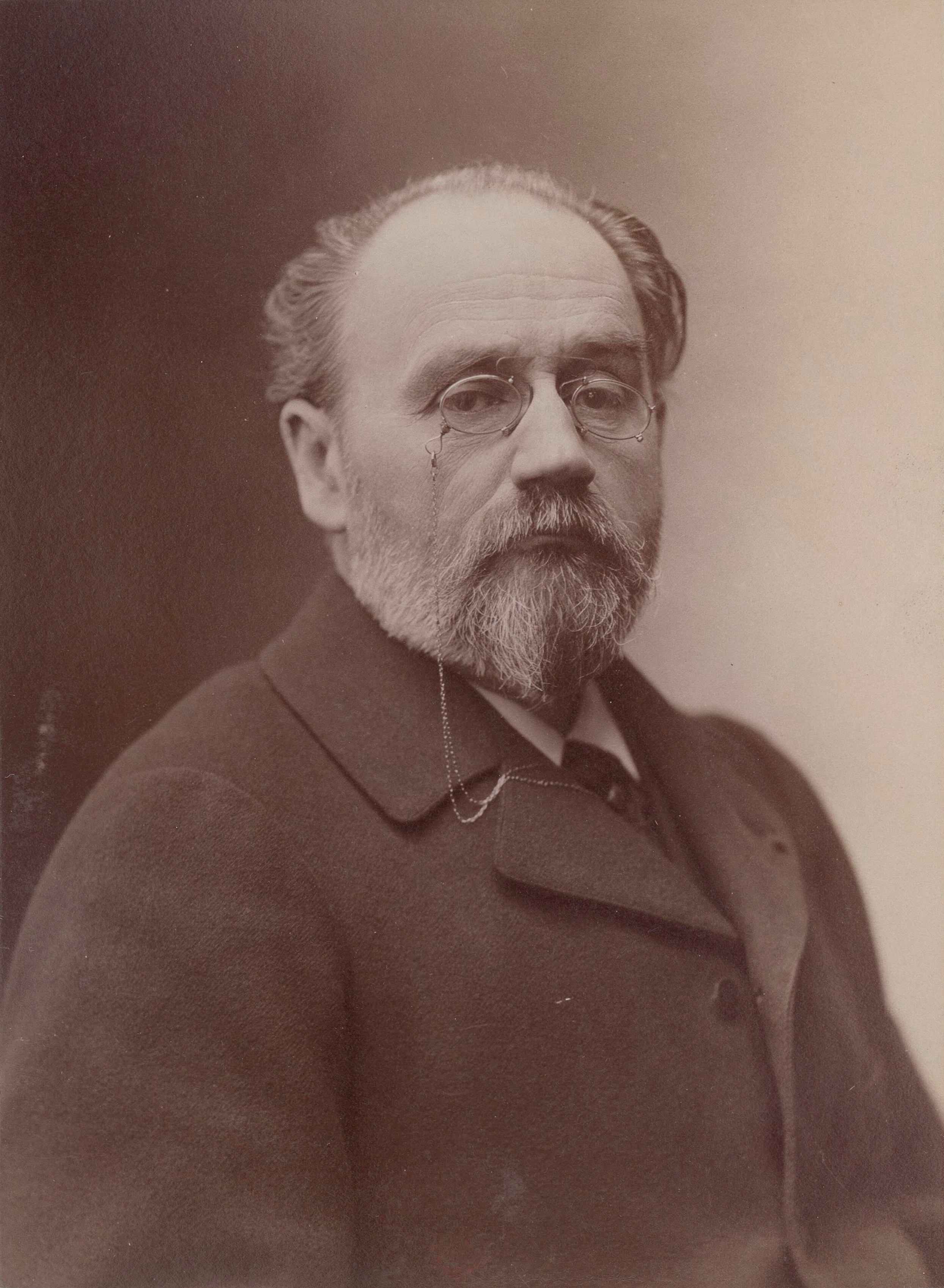 Émile Zola. Porträt von Nadar, um 1896.[1]